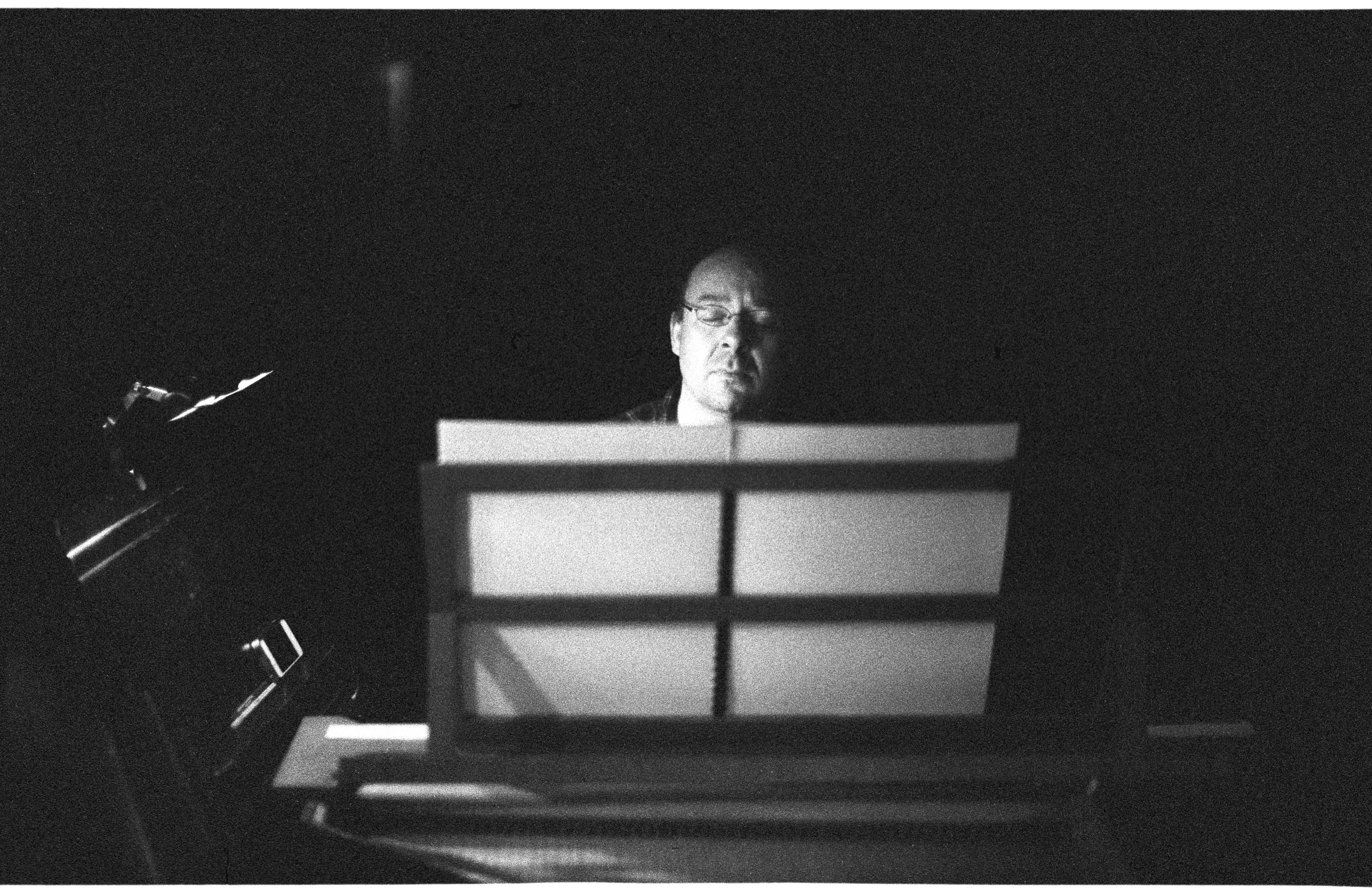 Arthur Schoonderwoerd